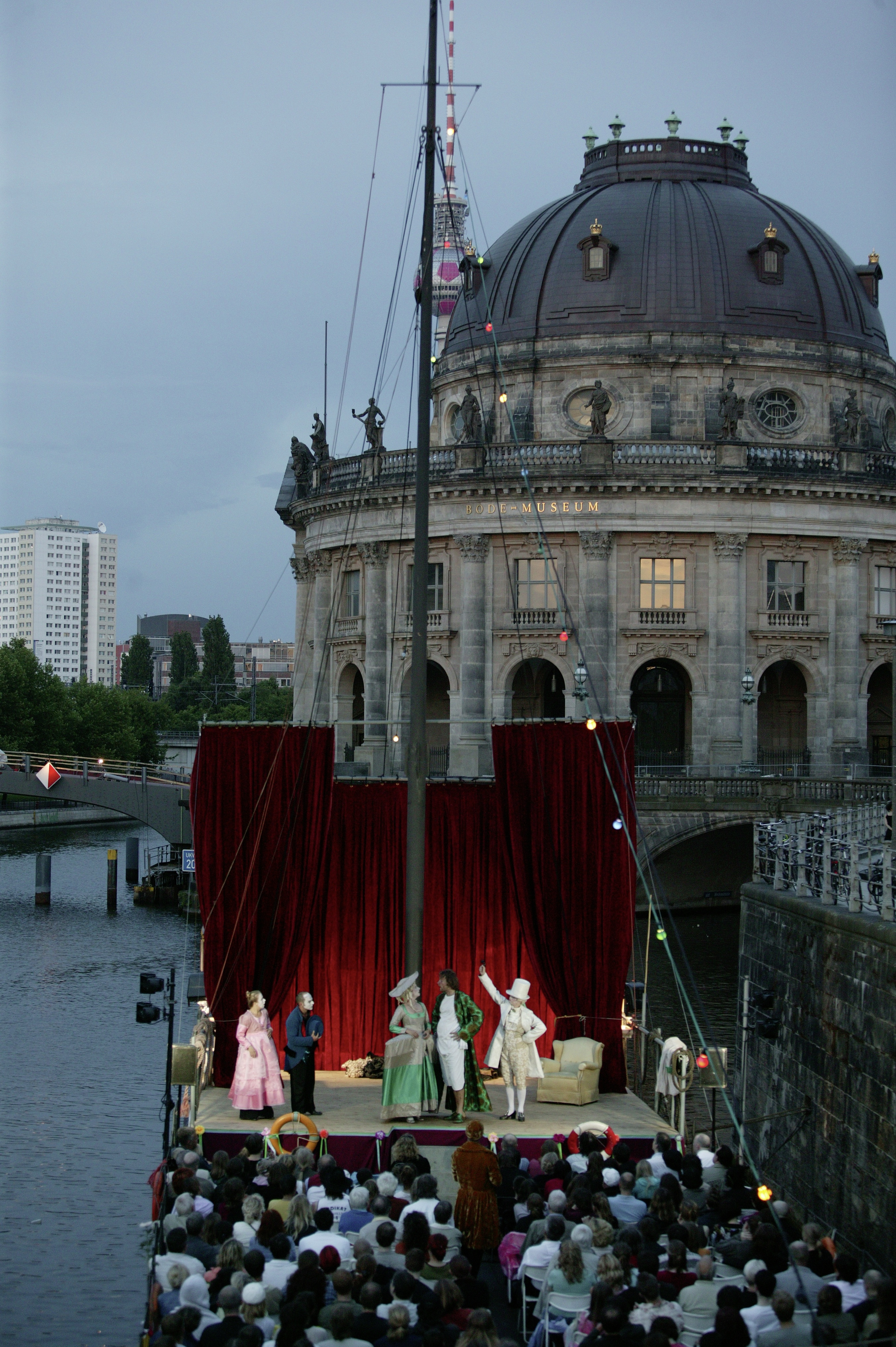 Theaterschiff Monbijou Theater am Bode-Museum Berlin. © bernd schönberger